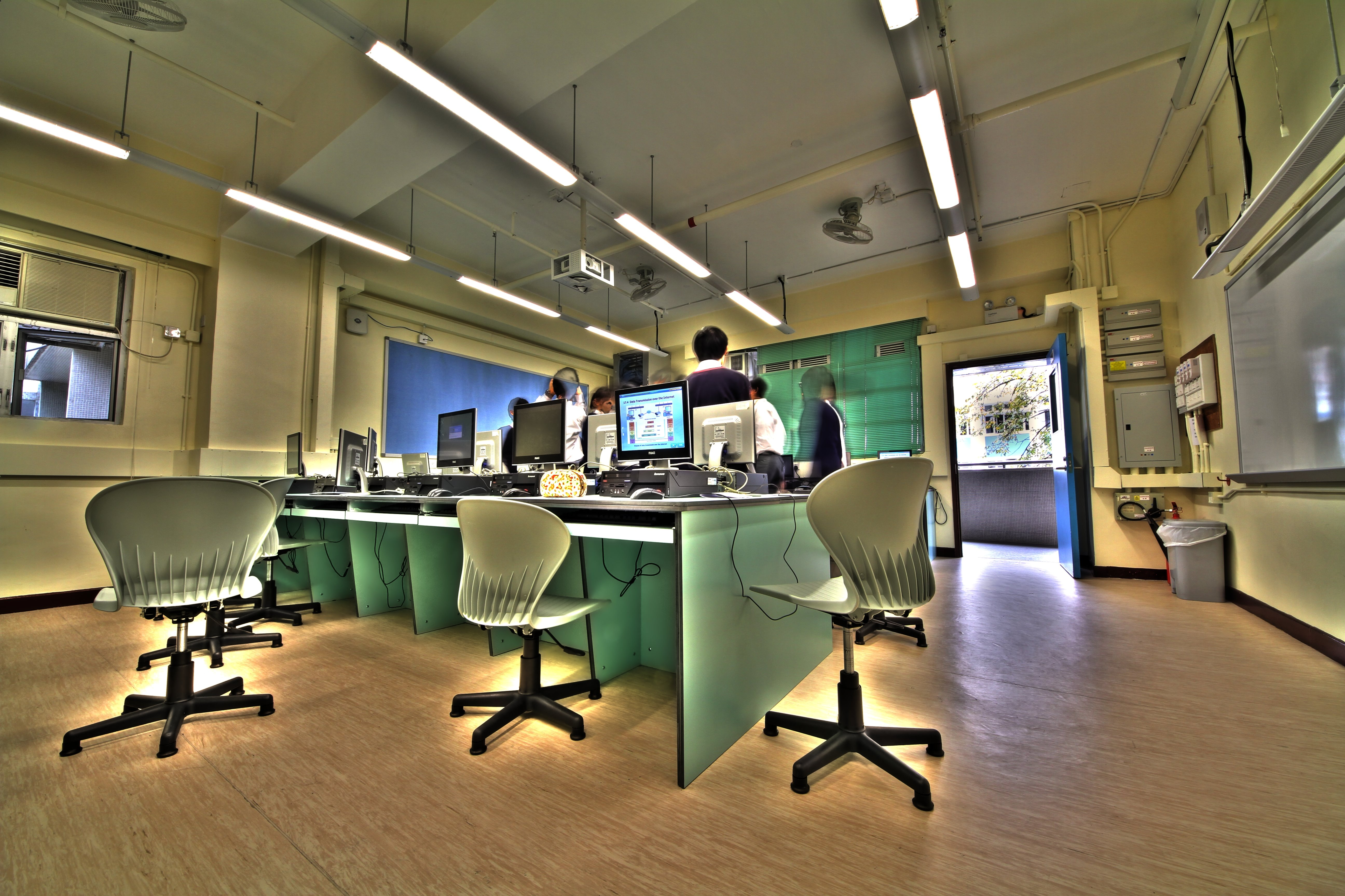 香港循道中學